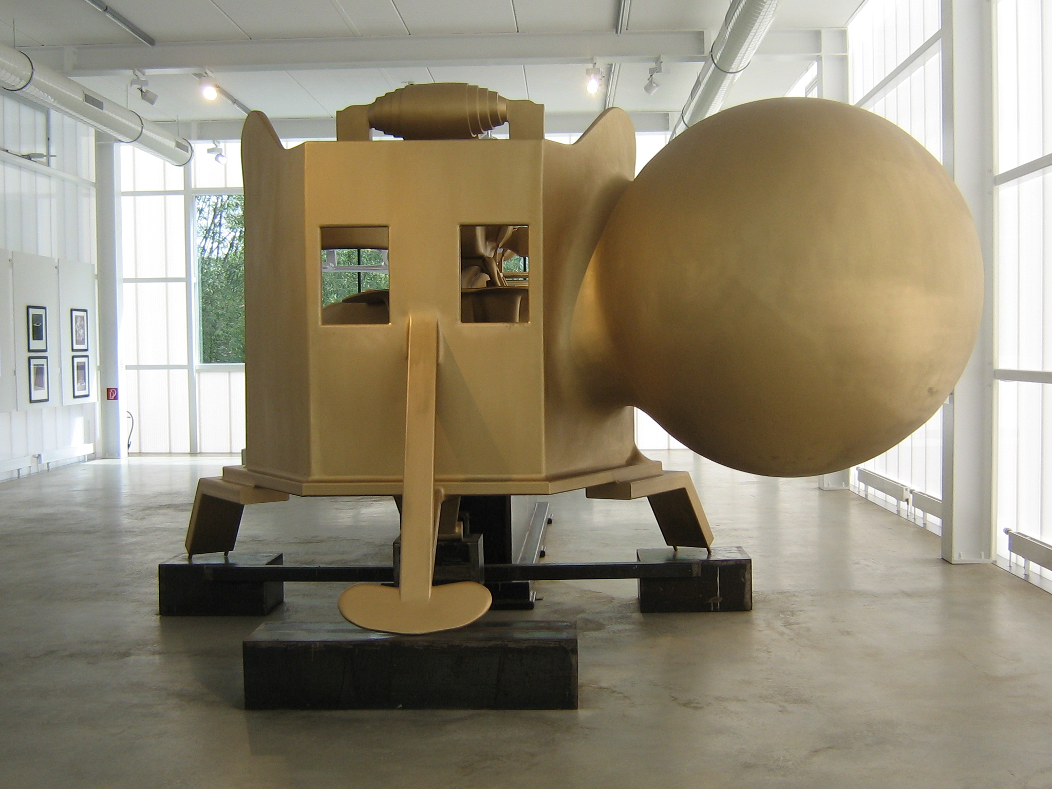 Skulptur von Bruno Gironcoli aus dem Gironcolimuseum im Schlosspark Herberstein